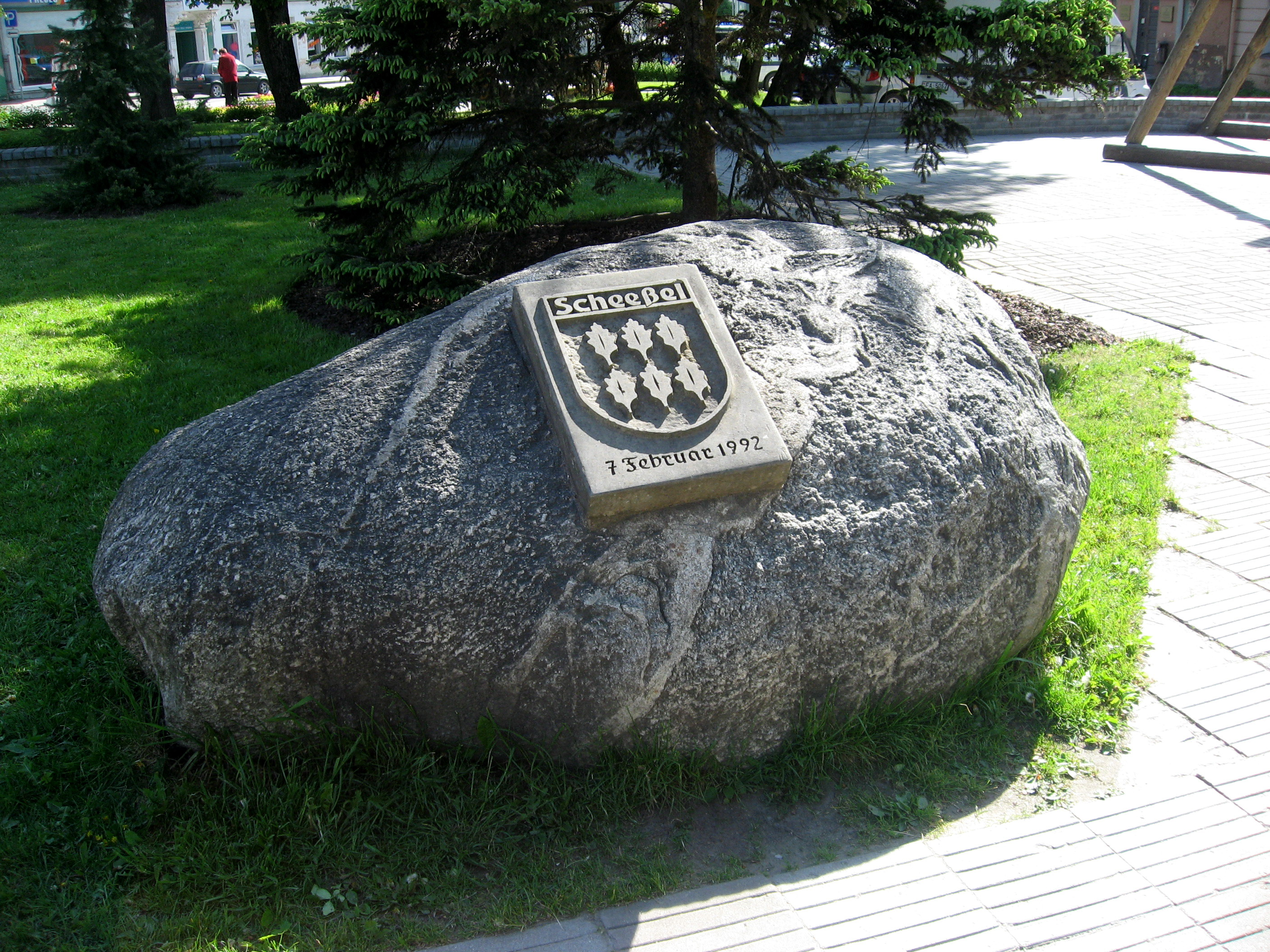 Tukums, balvan se znakem partnerské obce Scheeßel